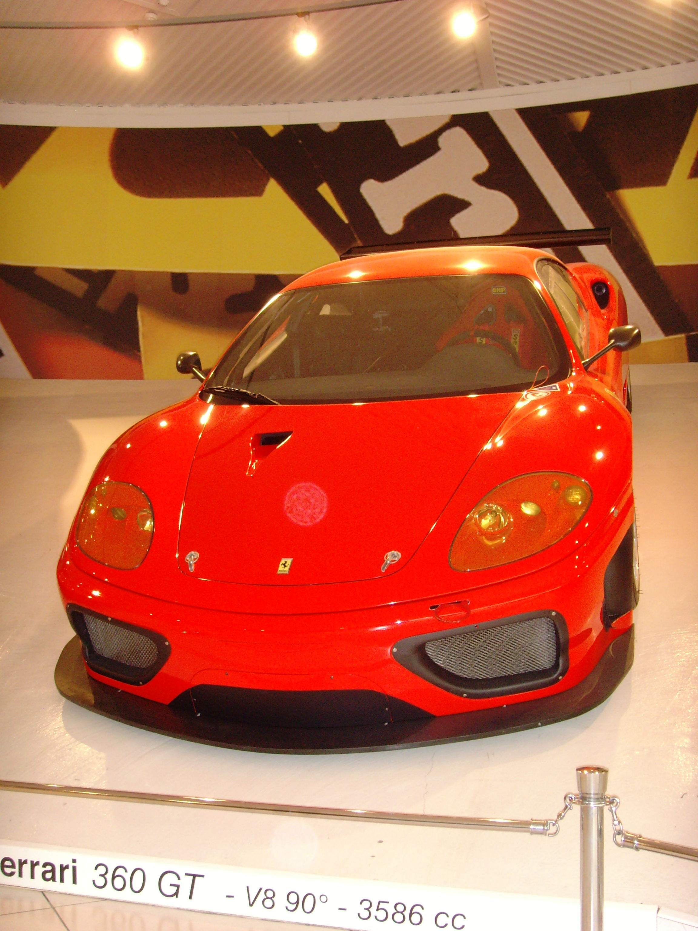 Galleria Ferrari